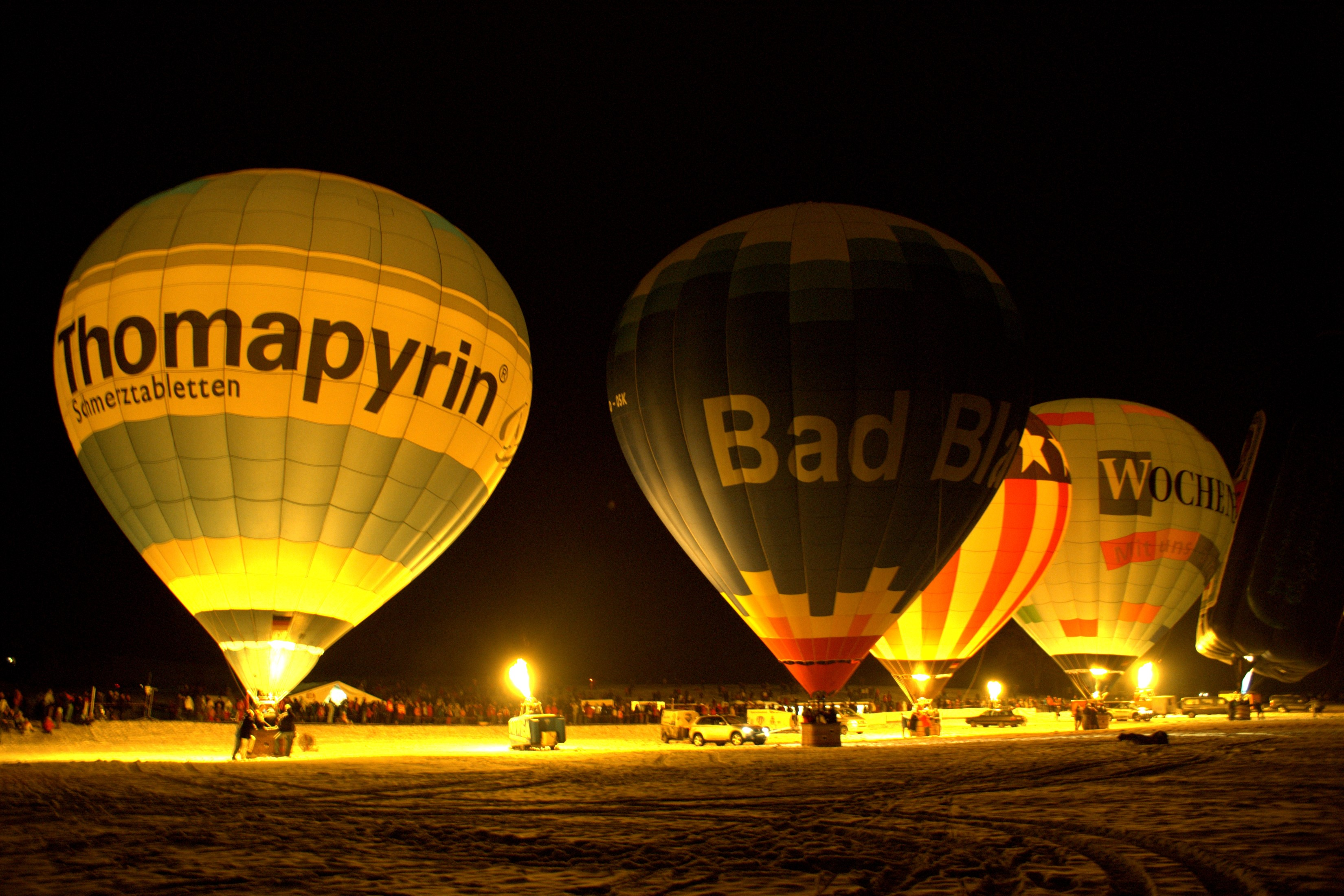 Das Bild entstand beim Drei-Königs-Ballonglühen 2009 in Kißlegg